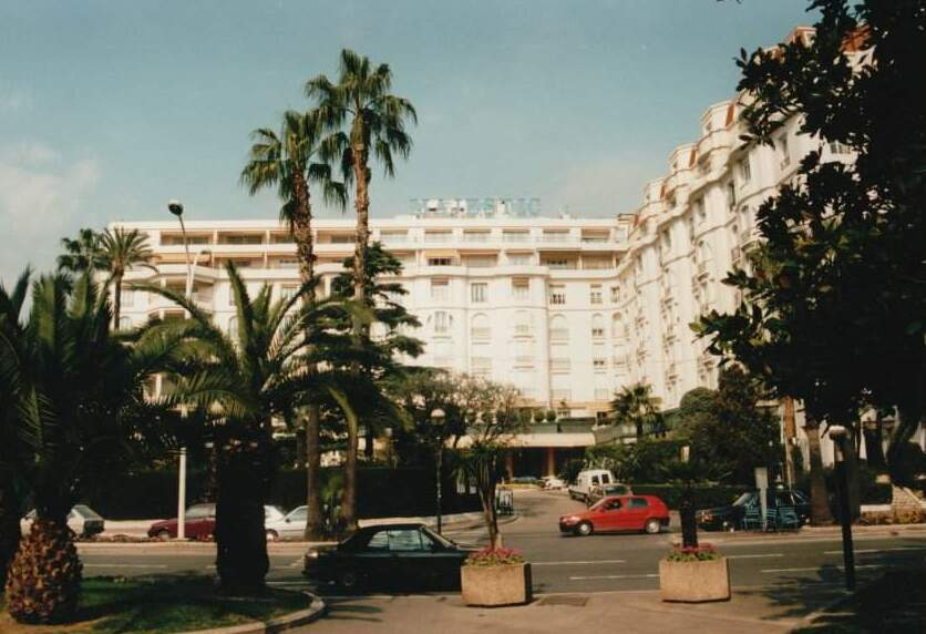 Hotel Majestic Cannes croisette